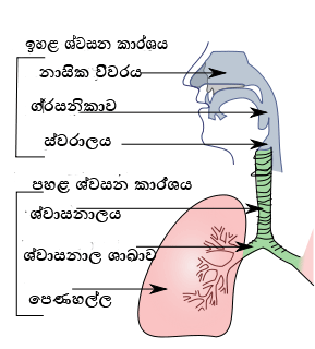 සිංහල: ශ්වසන කාර්ෂය